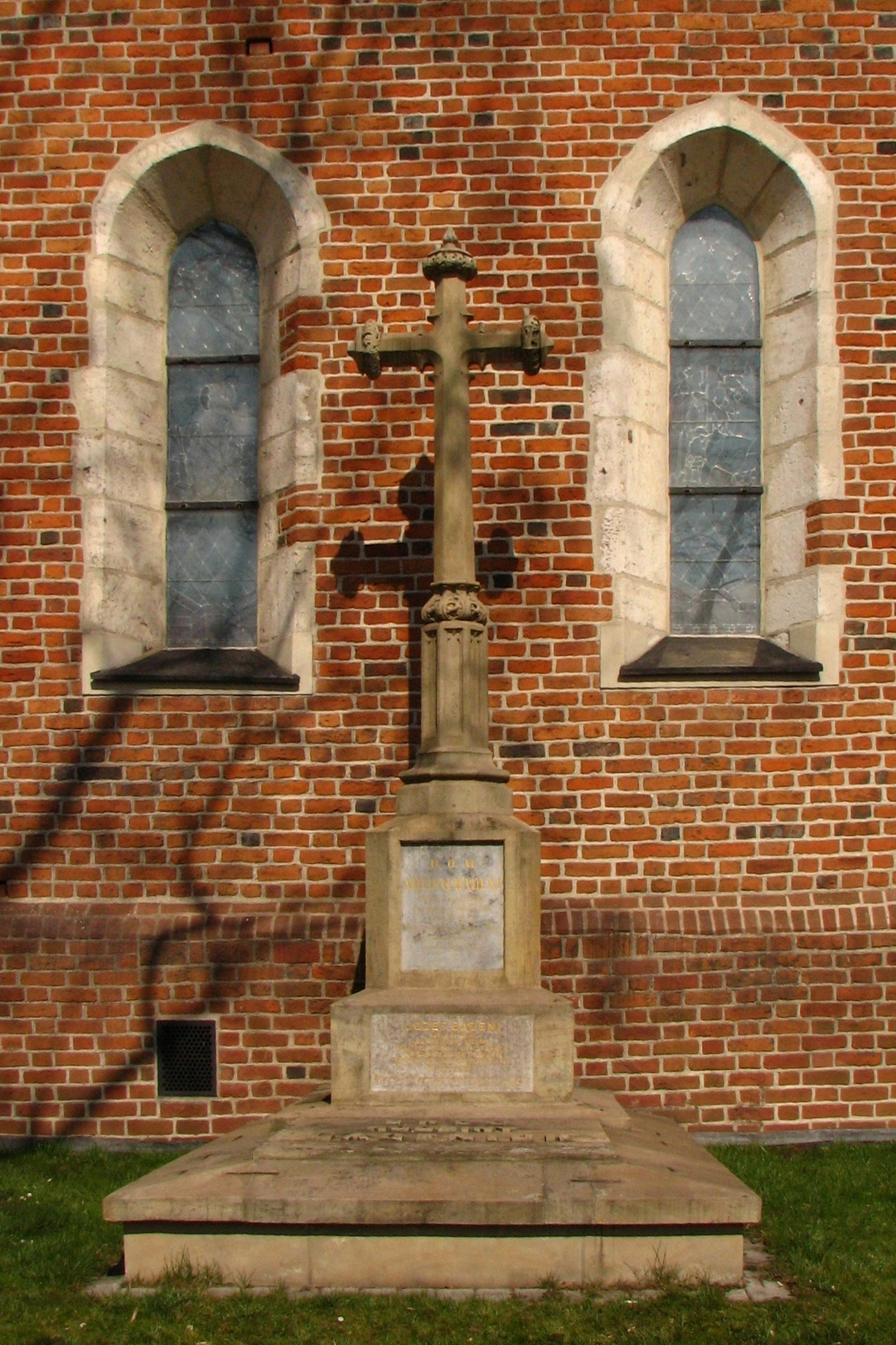 grób rodziny Badenich, w tym Michała Badeniego i Józefa Badeniego (1836–1878) pod ścianą kościoła Dziesięciu Tysięcy Męczenników w Niepołomicach